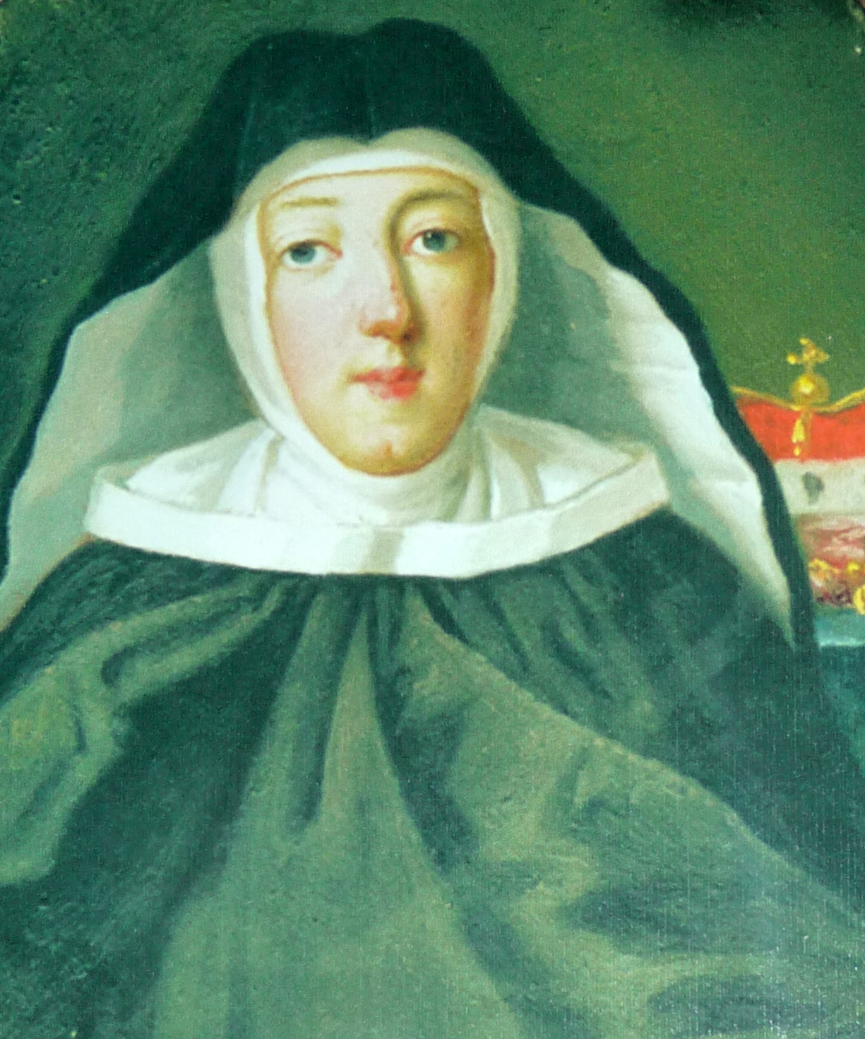 Das Bild zeigt Prinzessin Maria Anna von Bayern (1696–1750) nach ihrem Eintritt ins St. Jakob (München)